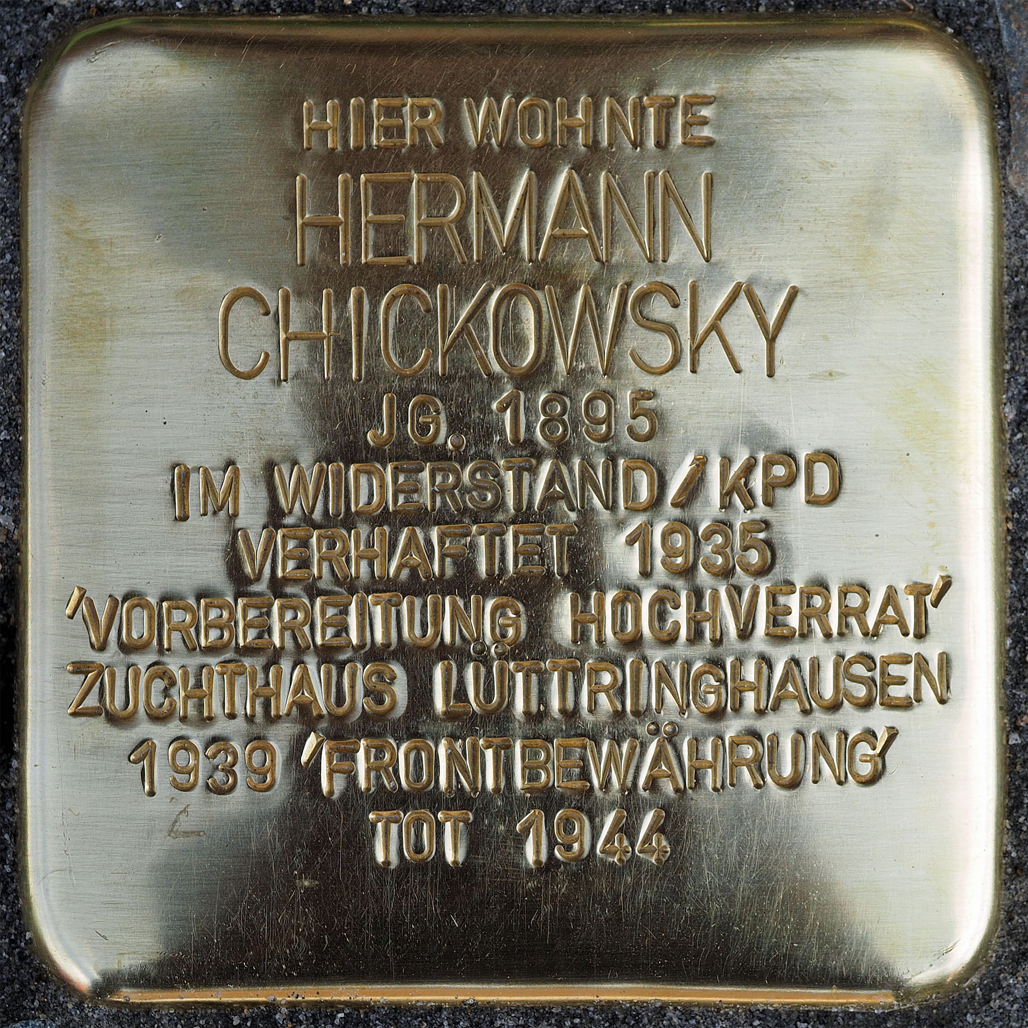 Stolpersteine Kempen: Chickowsky, Hermann